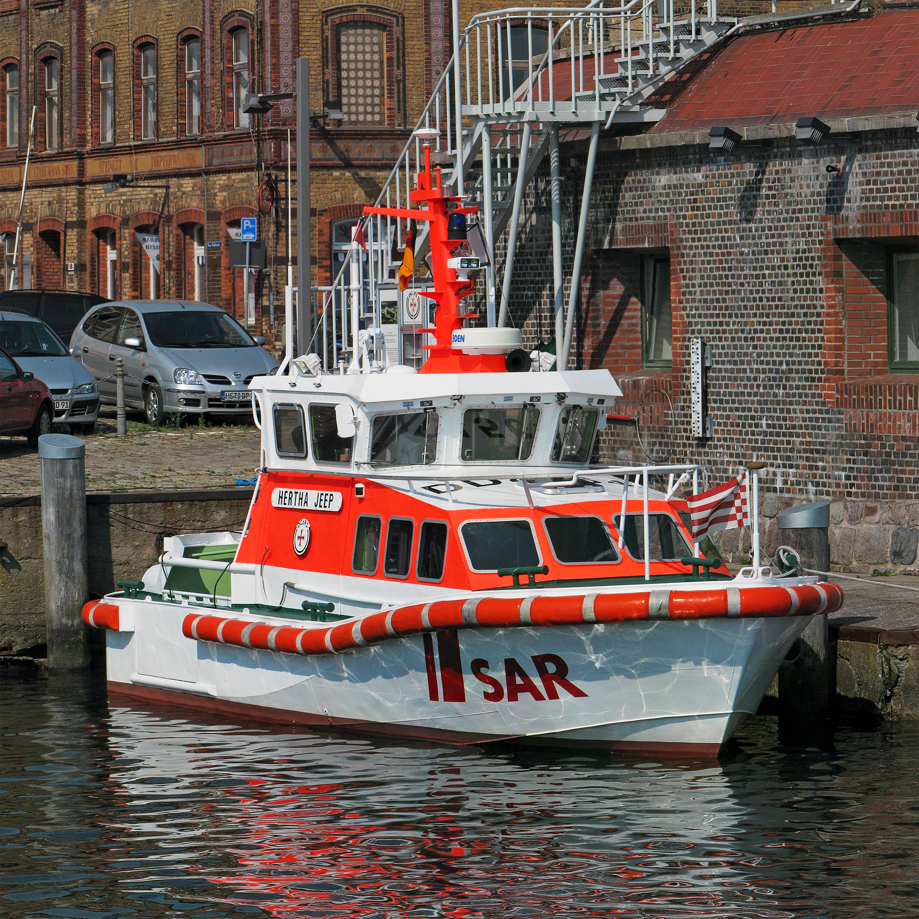 Dieses Bild zeigt das Seenotrettungsboot (SRB) „Hertha Jeep“ im Hafen von Stralsund (neben dem Hafen und Seemannsamt)